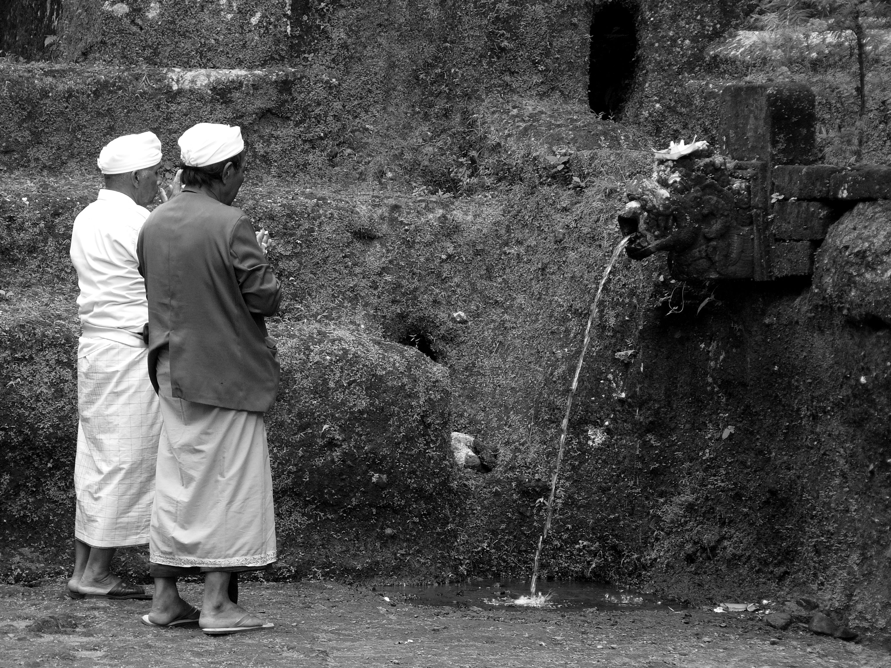 Gunung Kawi, Tampaksiring, Bali